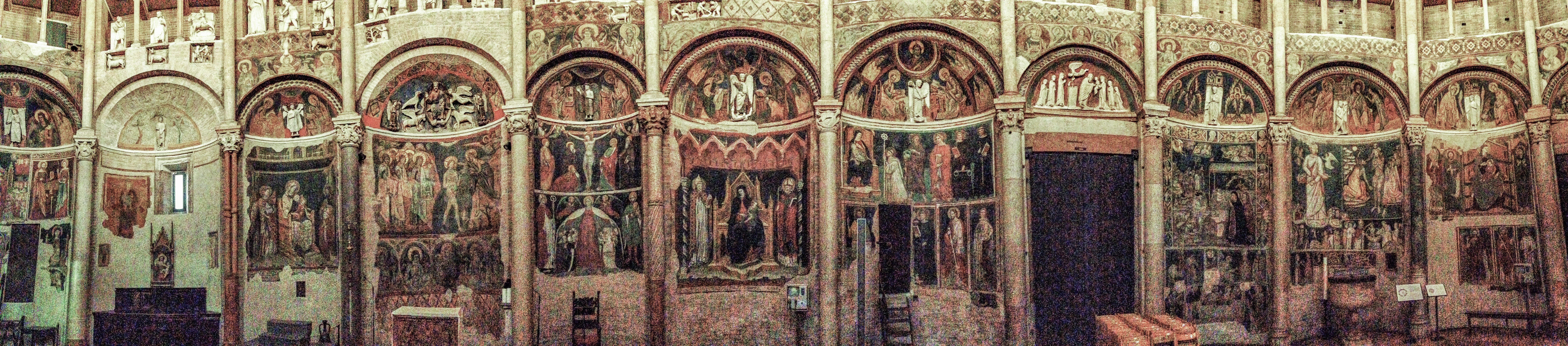 Panoramica degli affreschi nei catini del battistero